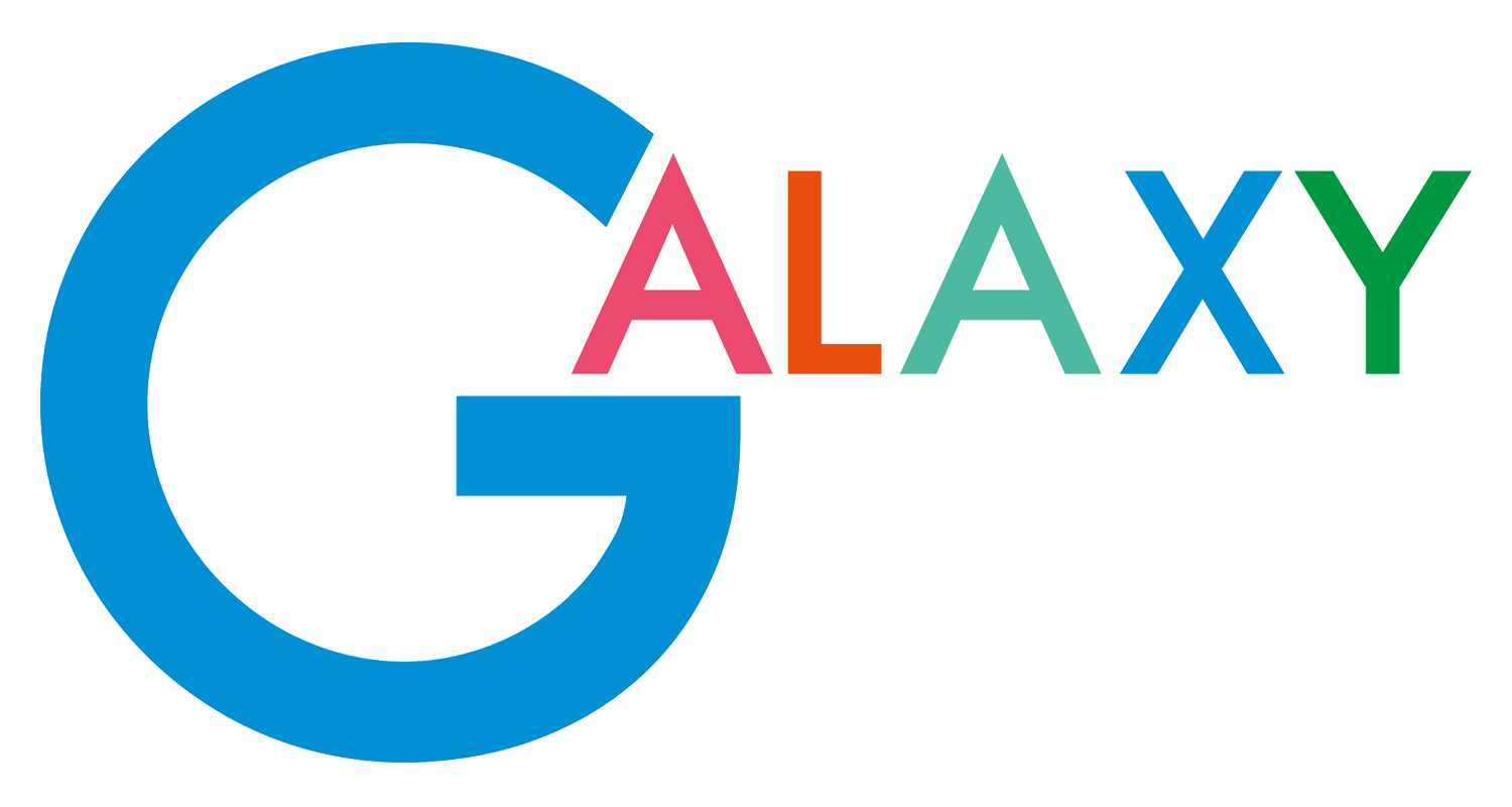 Galaxy logo